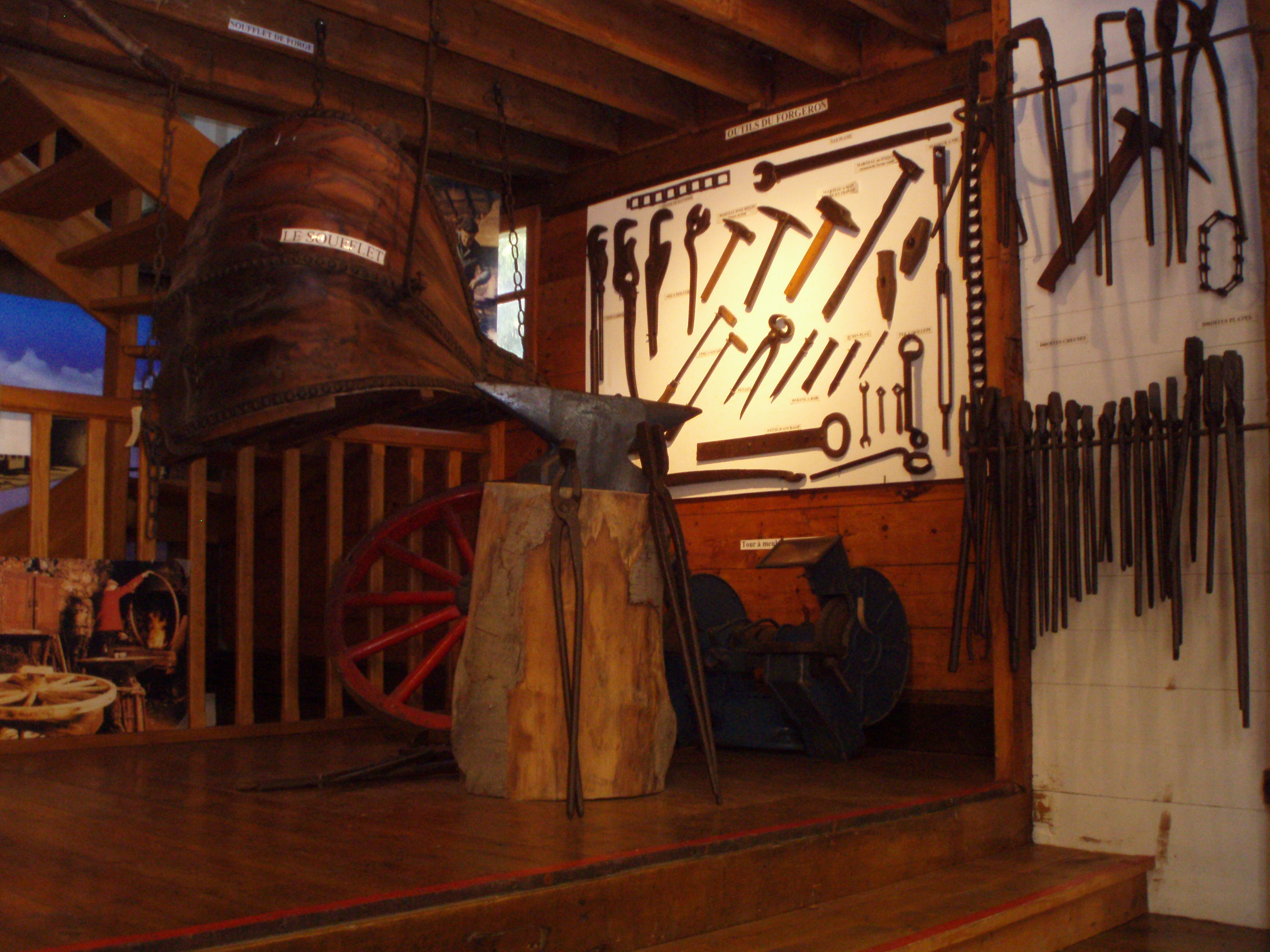 la forge